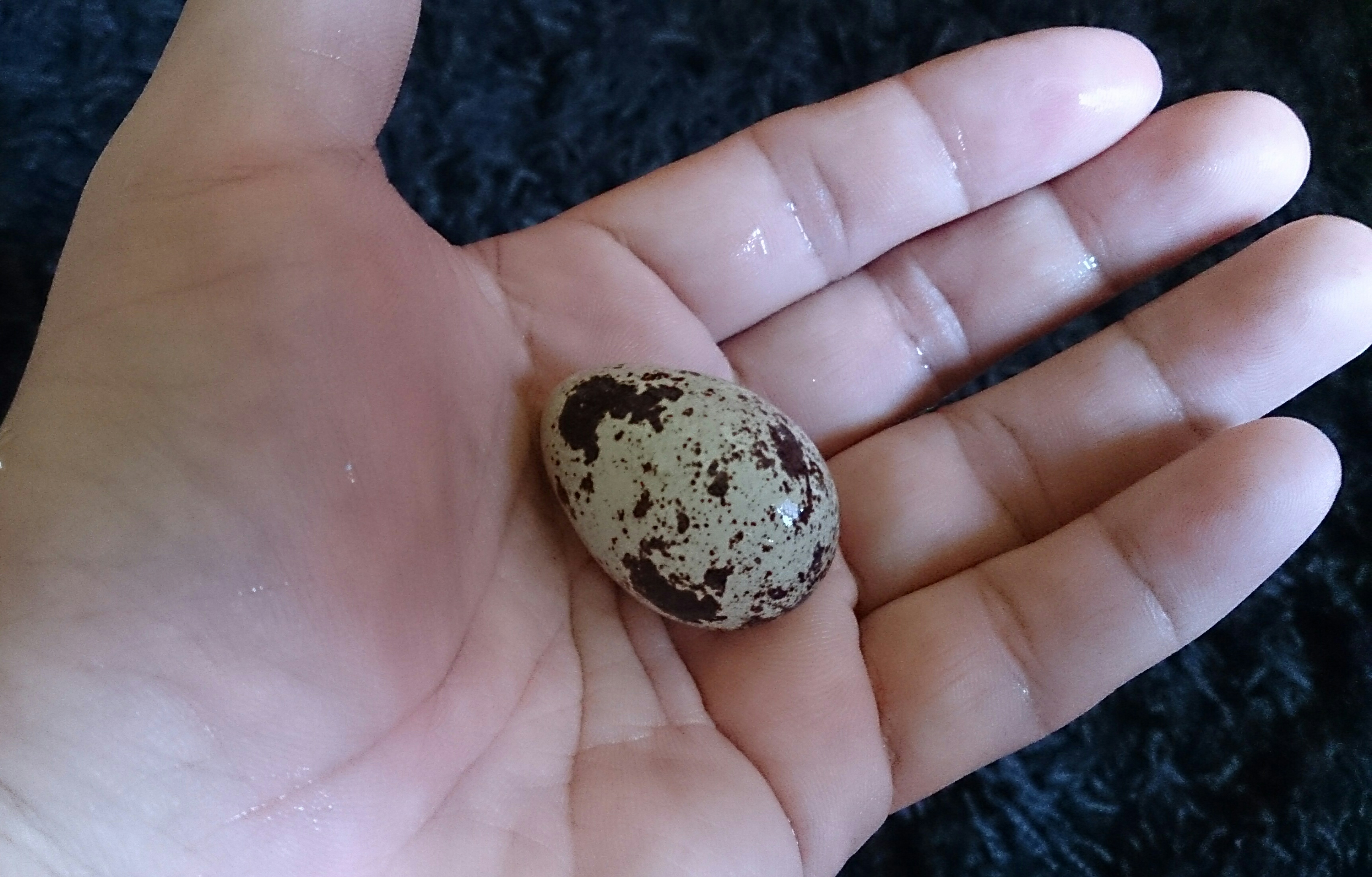 quail egg